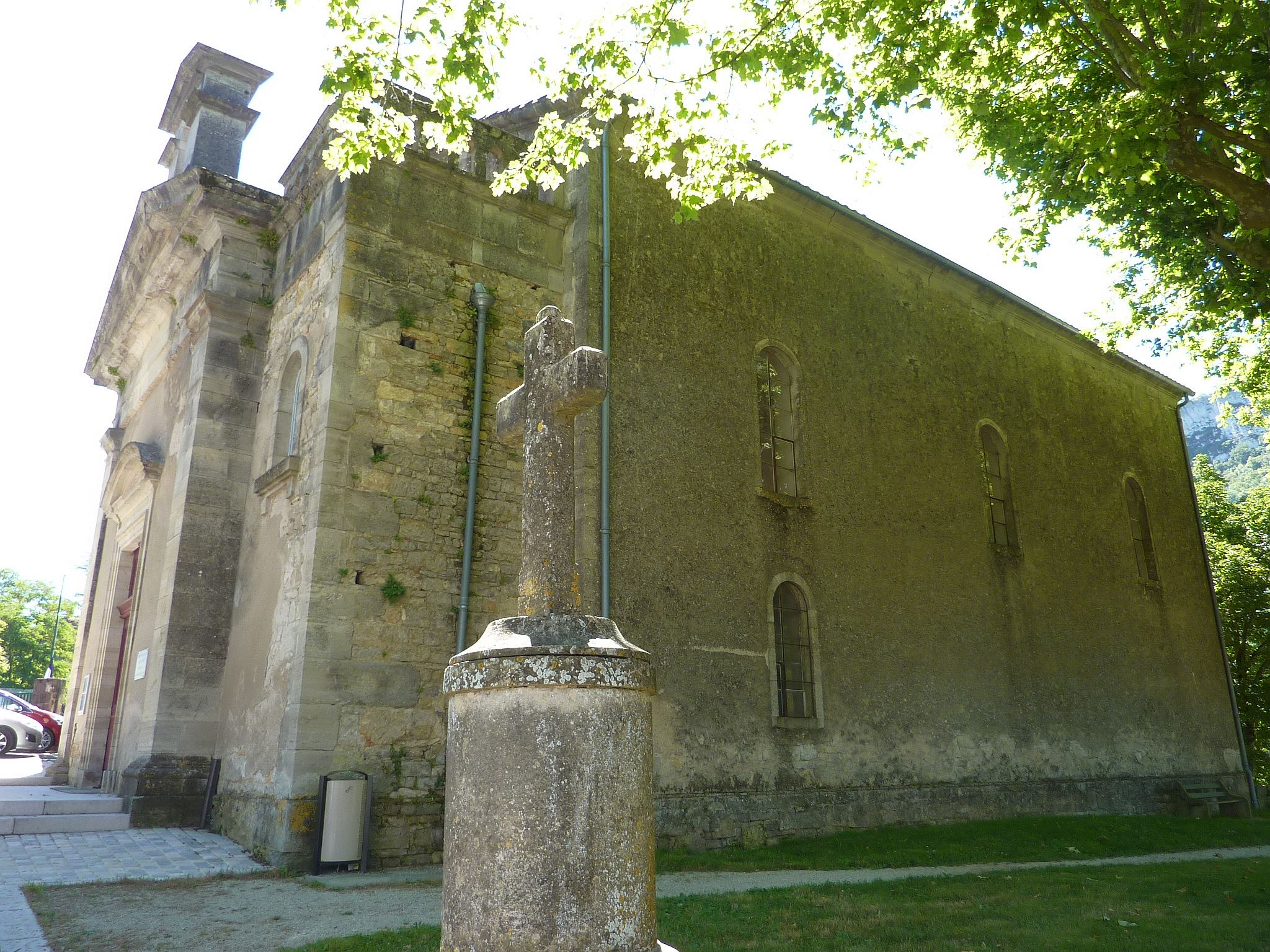 Temple protestant de Saint-Antonin-Noble-Val